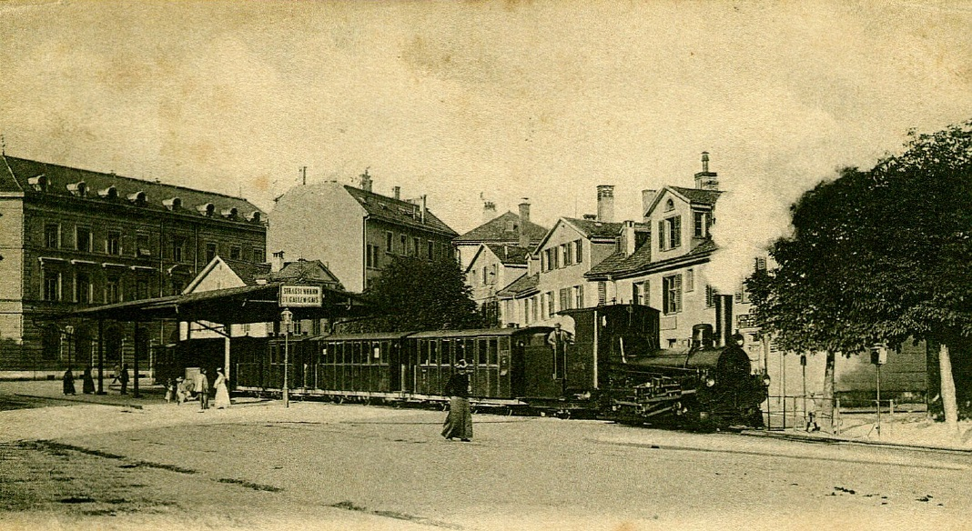 Der erste Bahnhof in St. Gallen der Appenzeller Strassenbahn befand sich auf dem Bahnhofplatz vor der heutigen Hauptpost. Links ist die damalige Hauptpost, das spätere Rathaus, abgebrochen 1977.